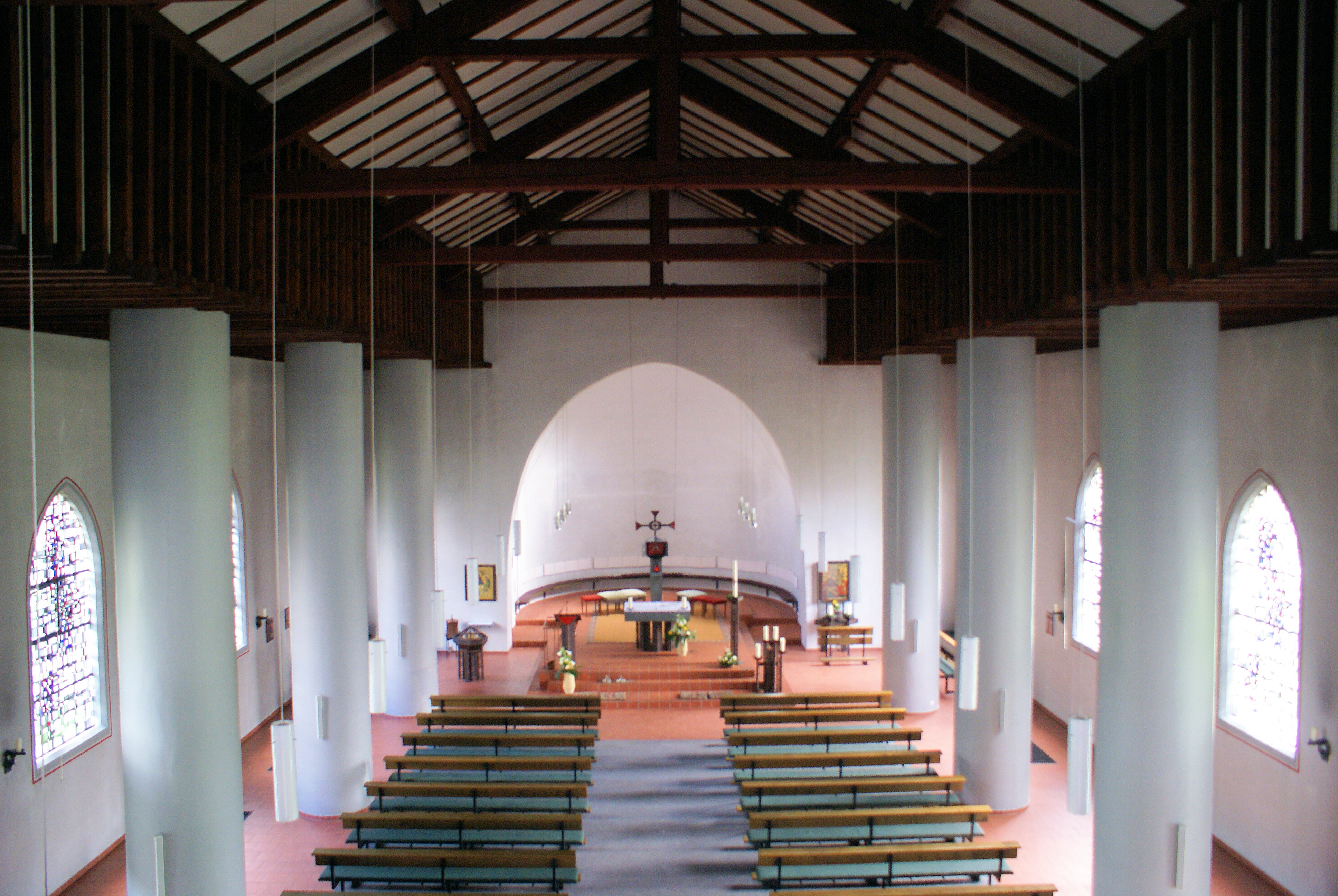 St. Marien in Dorsten-Hervest, Landkreis Recklinghausen, Nordrhein-Westfalen, Deutschland